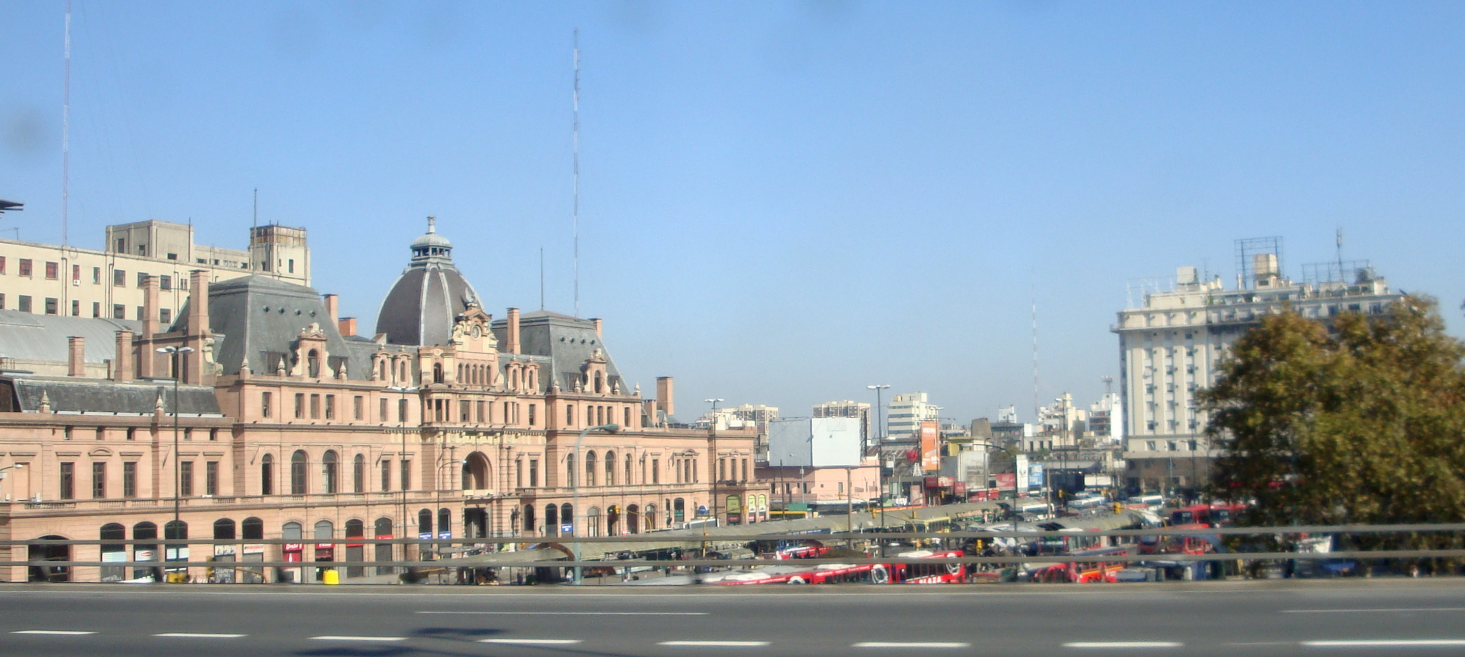 Vista de la Estación de ferrocarril Constitución y la dársena de colectivos.